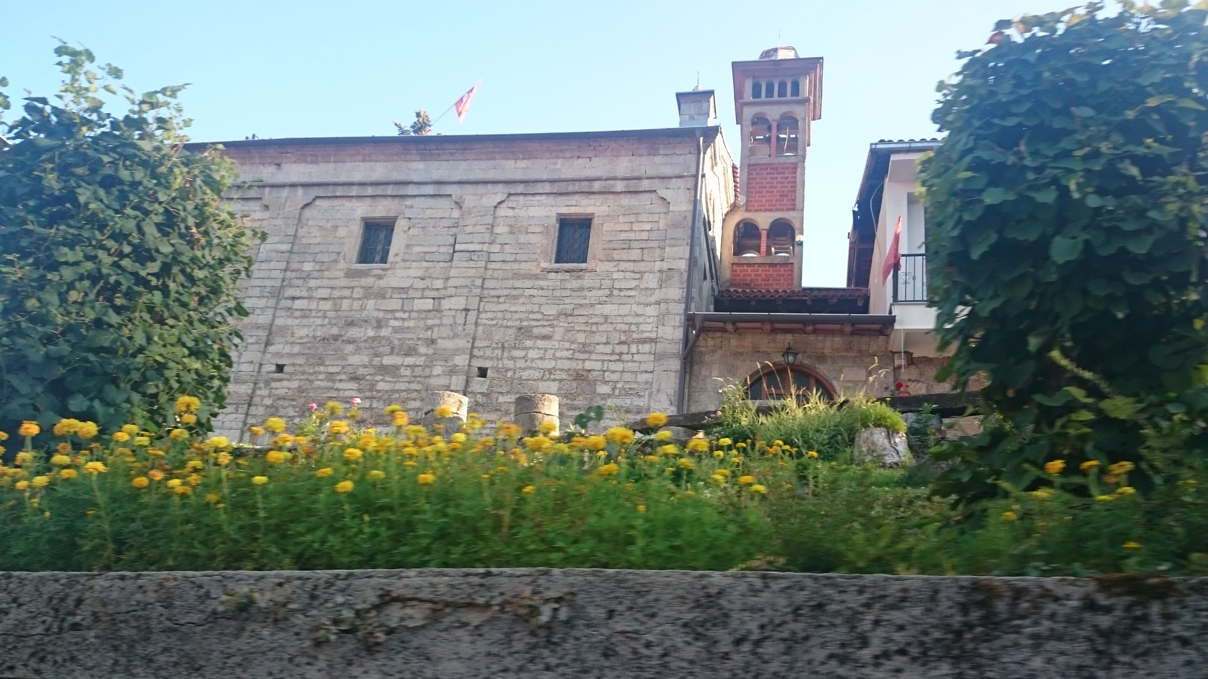 Црква „Св. Никола“ во Вевчани